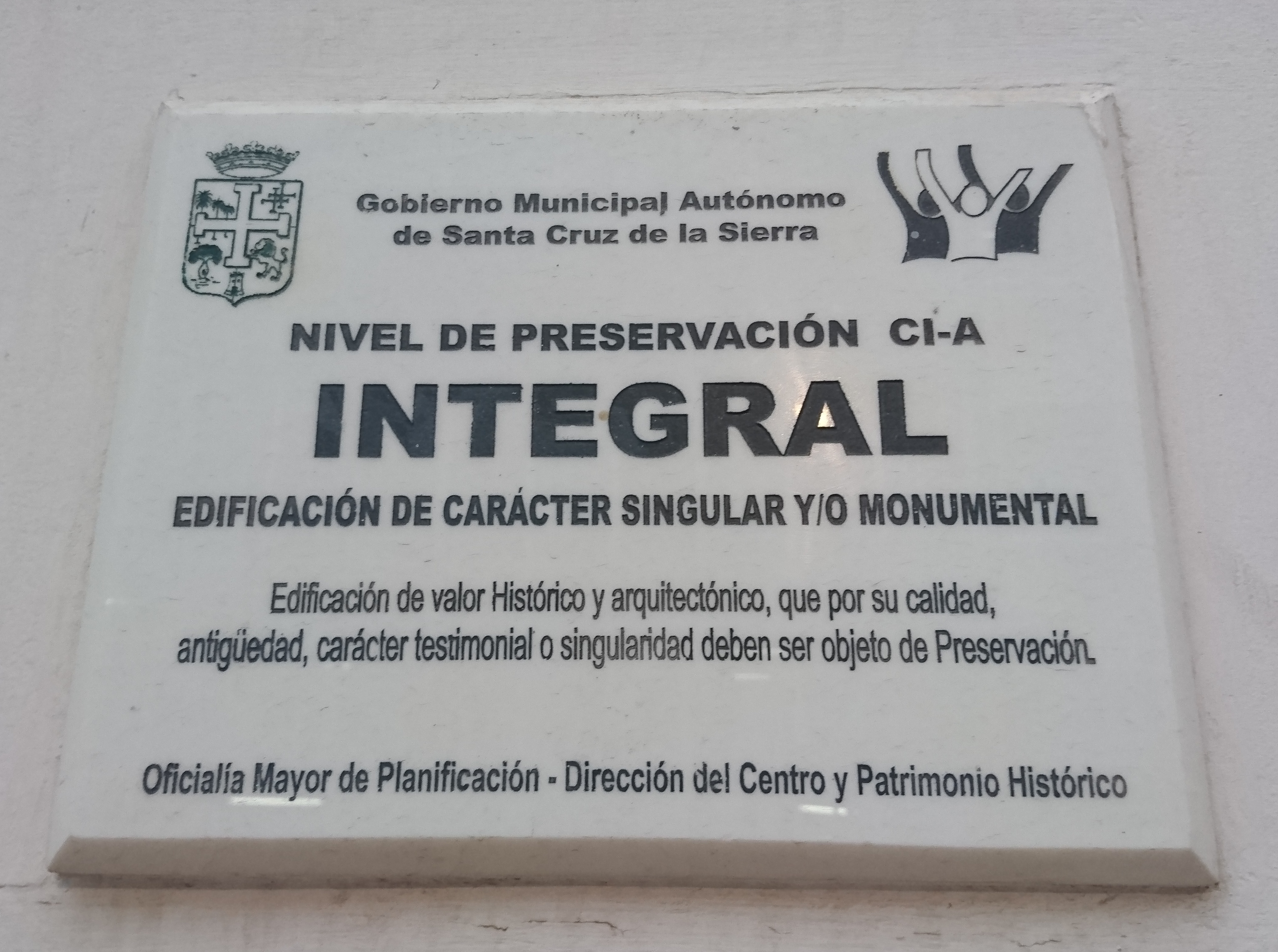 Museo Histórico This medium shows the protected monument with the number S/00-036 in Bolivia.